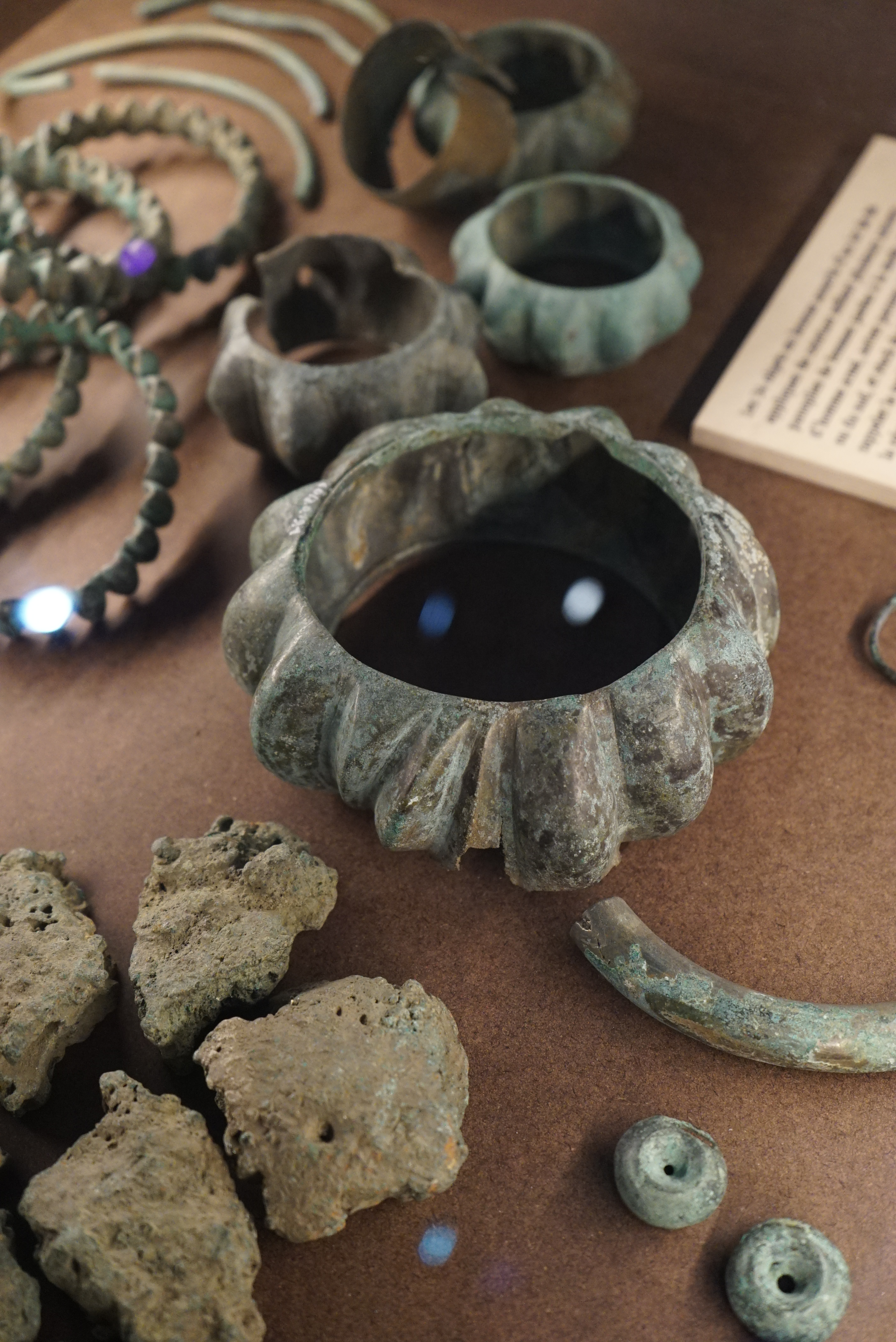 exposé à Troyes.